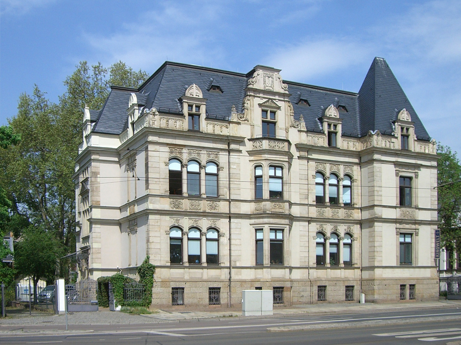 Leipzig, Karl-Tauchnitz-Str. 10 - Architekt: Peter Dybwad